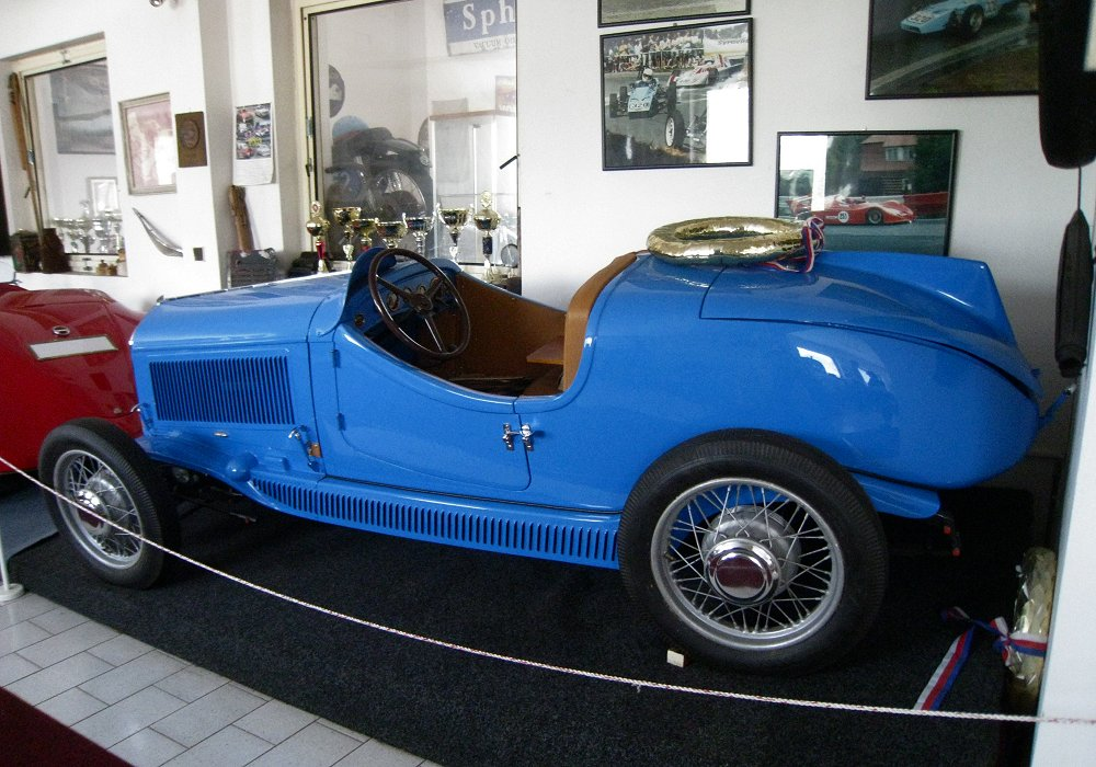 Walter Junior S (1933) sportovní v Nové Pace